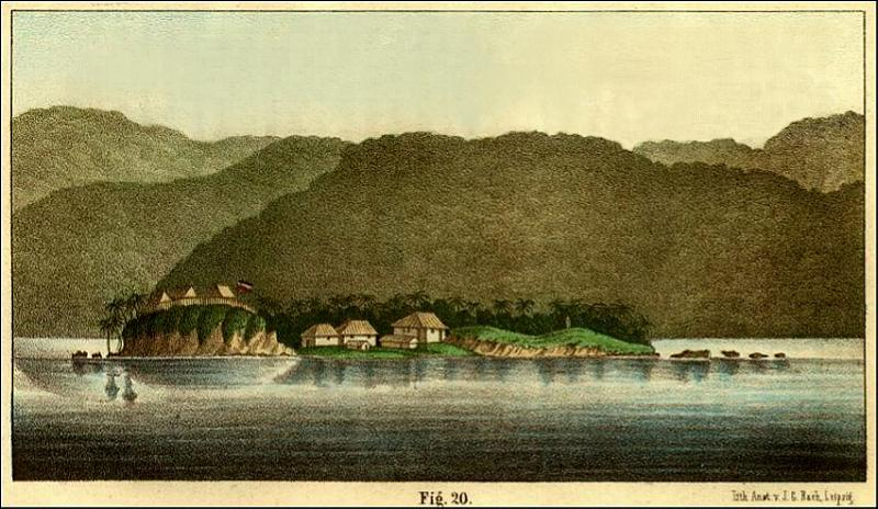 Tapanuli-Bai